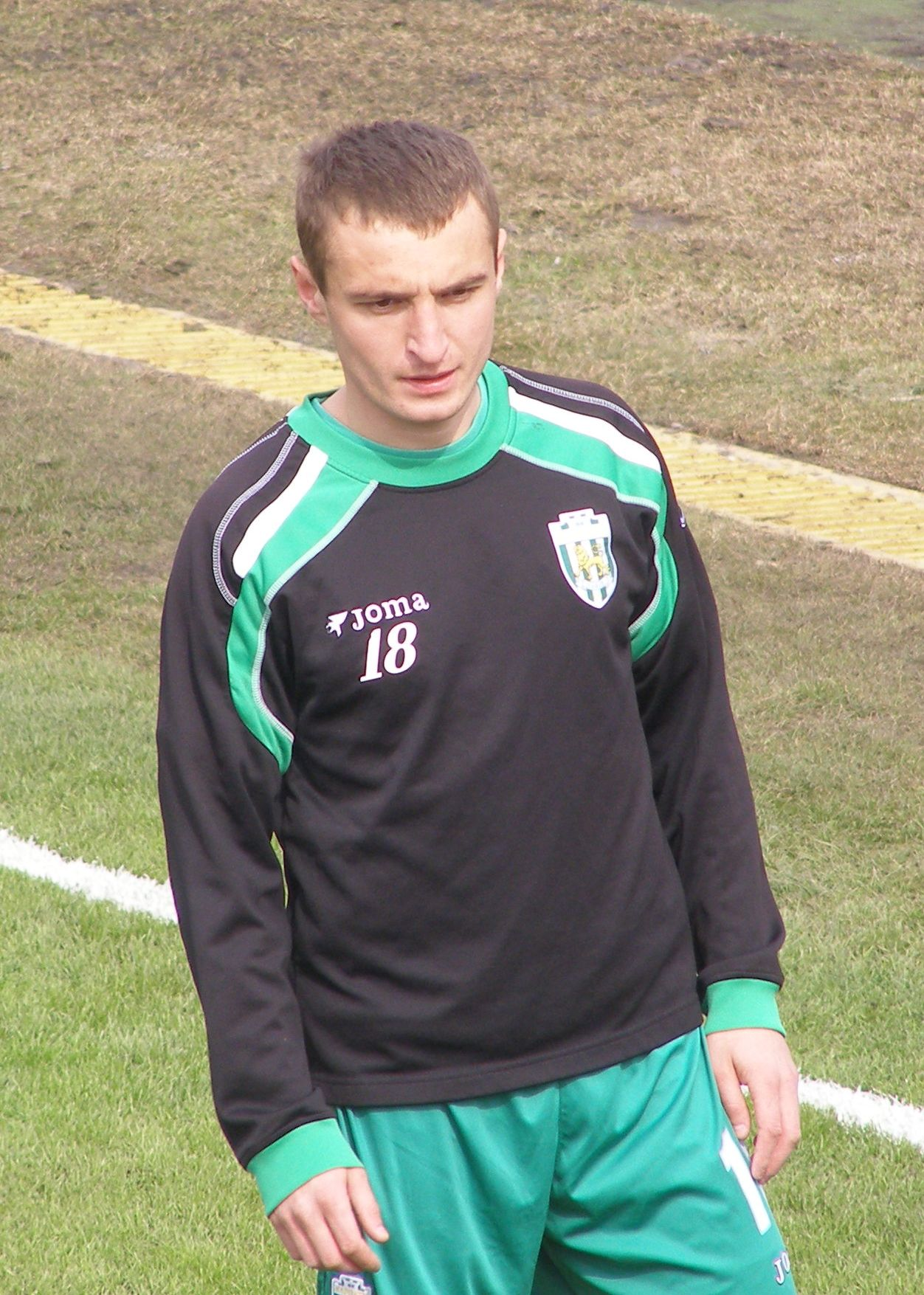 Mychajlo Kopolowez - ukrainischer Fußballspieler